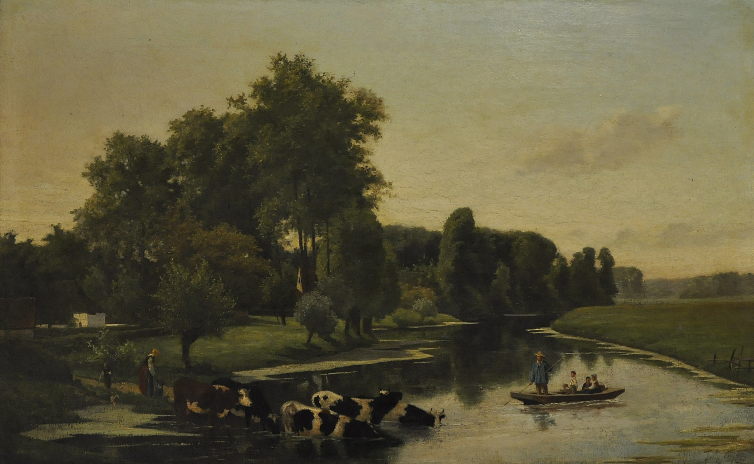 "De Leie te Deurle" door Felix Cogen (1838-1907), in het Museum Gevaert-Minne te Sint-Martens-Latem, België